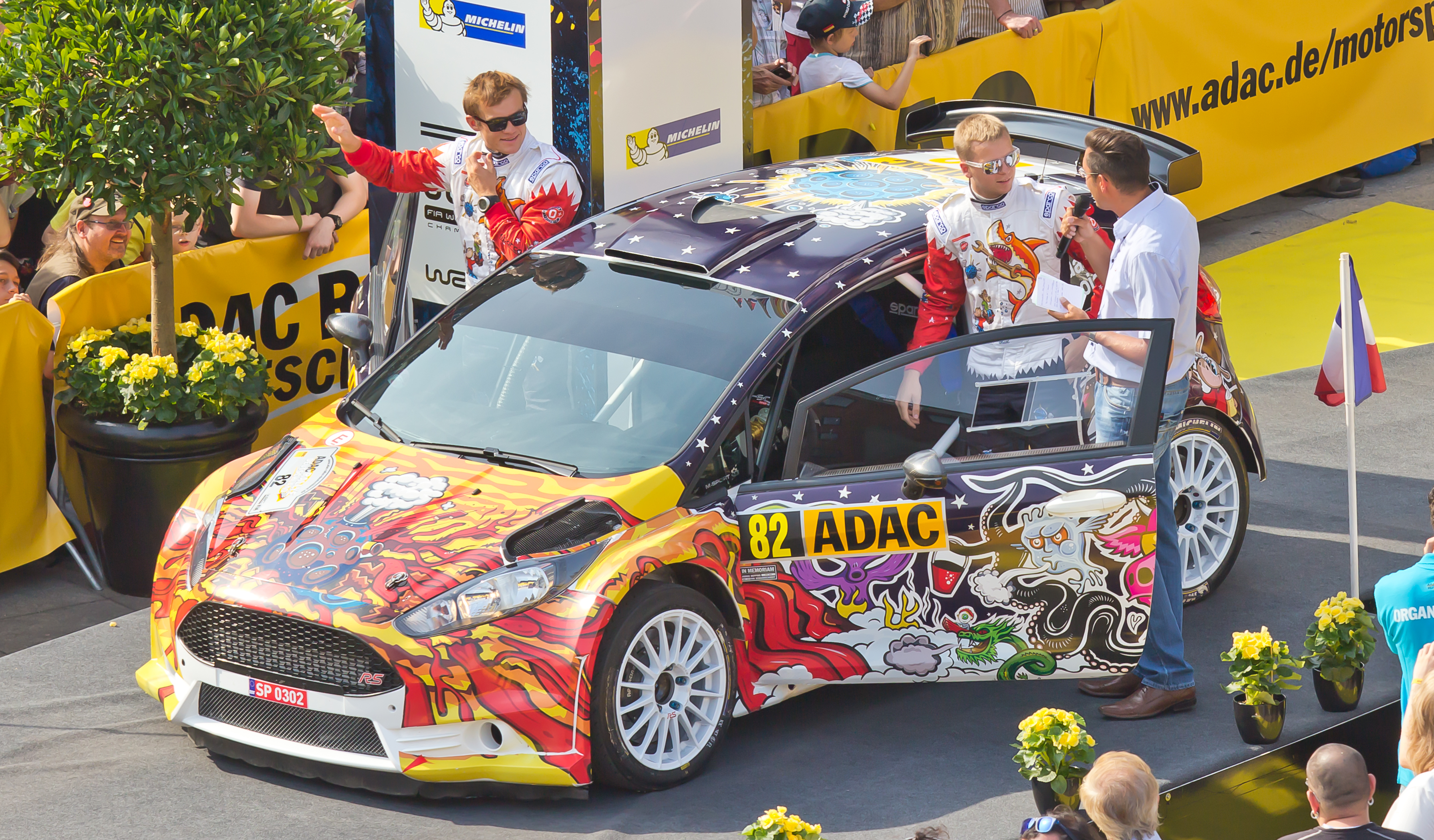 ADAC Rallye Deutschland 2013 - Fahrerpräsentation auf dem Roncalliplatz: Team MM Motorsport mit Fahrer Karl Kruuda und Co-Fahrer Martin Järveoja im Ford Fiesta R5